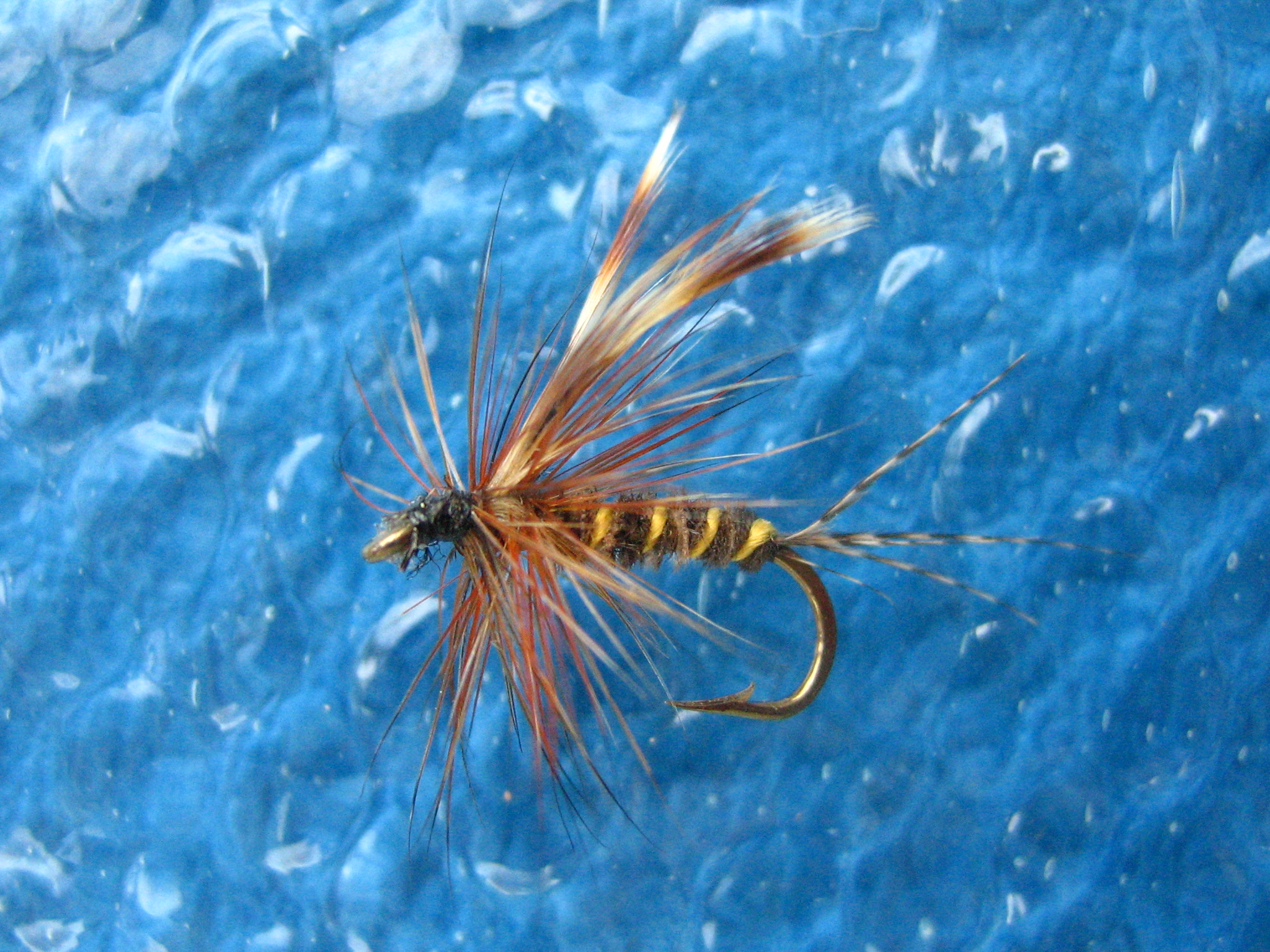 Vrbovka - modifikace (Willow Fly)